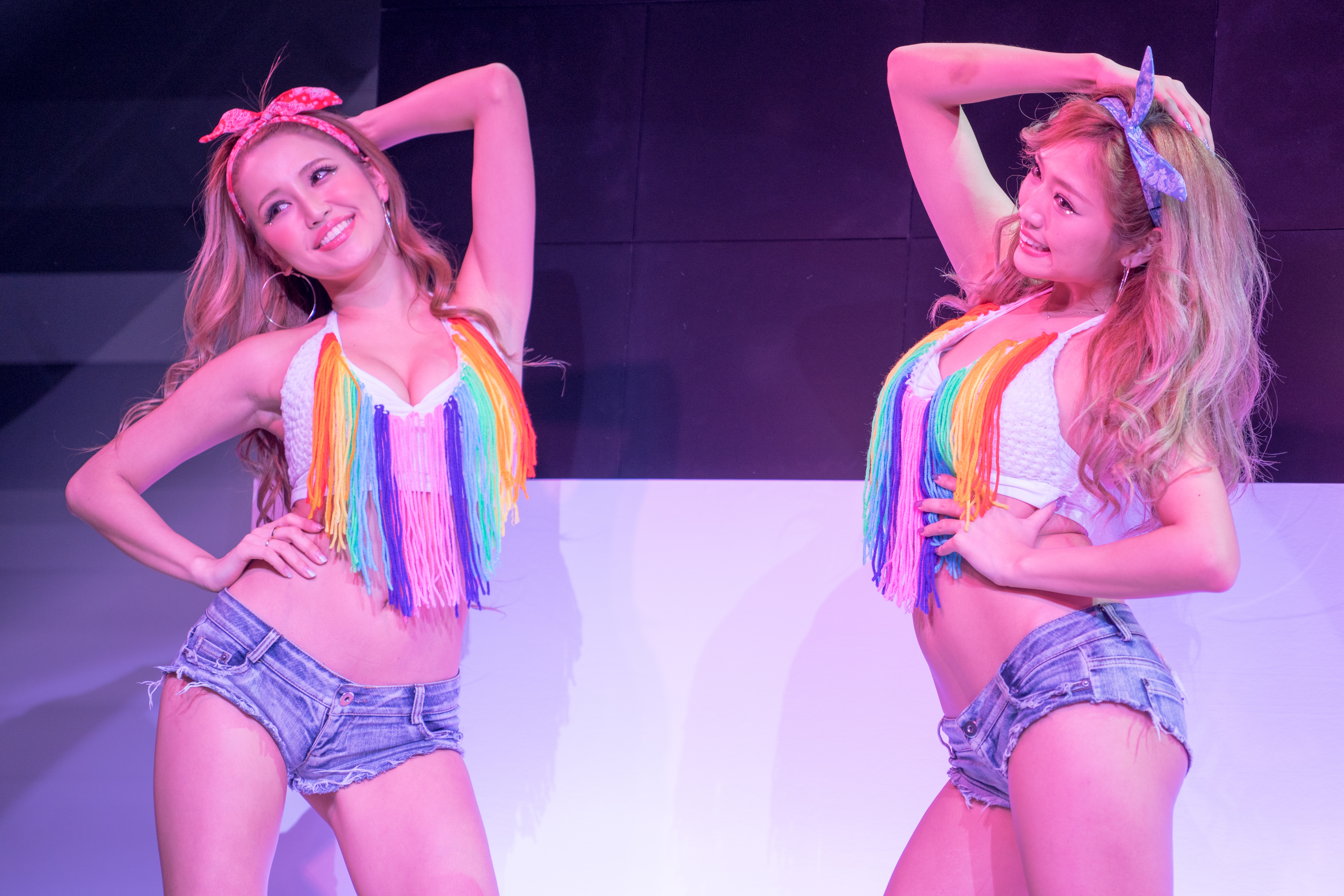 TOKYO AUTO SALON 2017 （東京オートサロン2017）-306.jpg